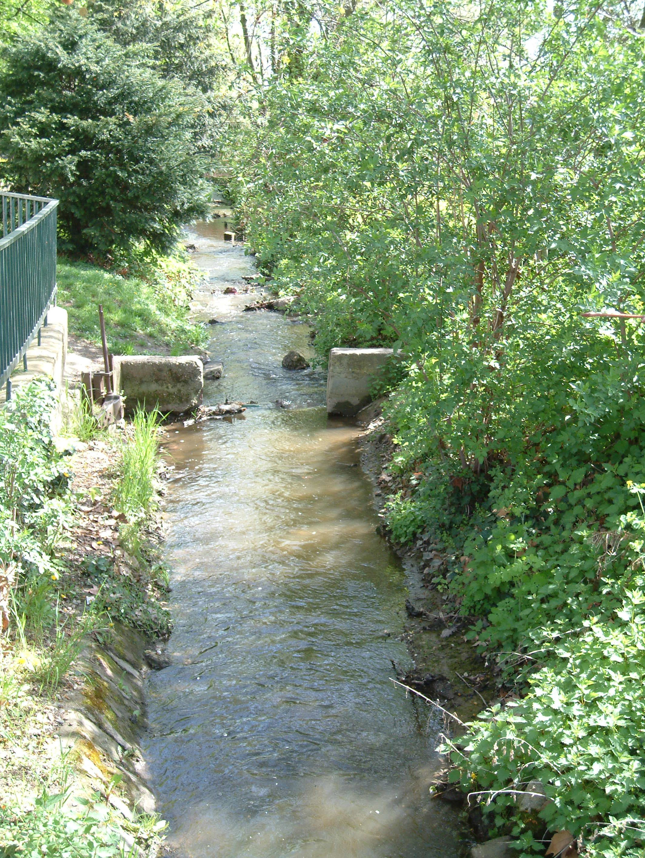 Wehr im Eckbach zu Dirmstein, selbst fotografiert am 28.04.2006 und freigegeben durch Benutzer:Mundartpoet